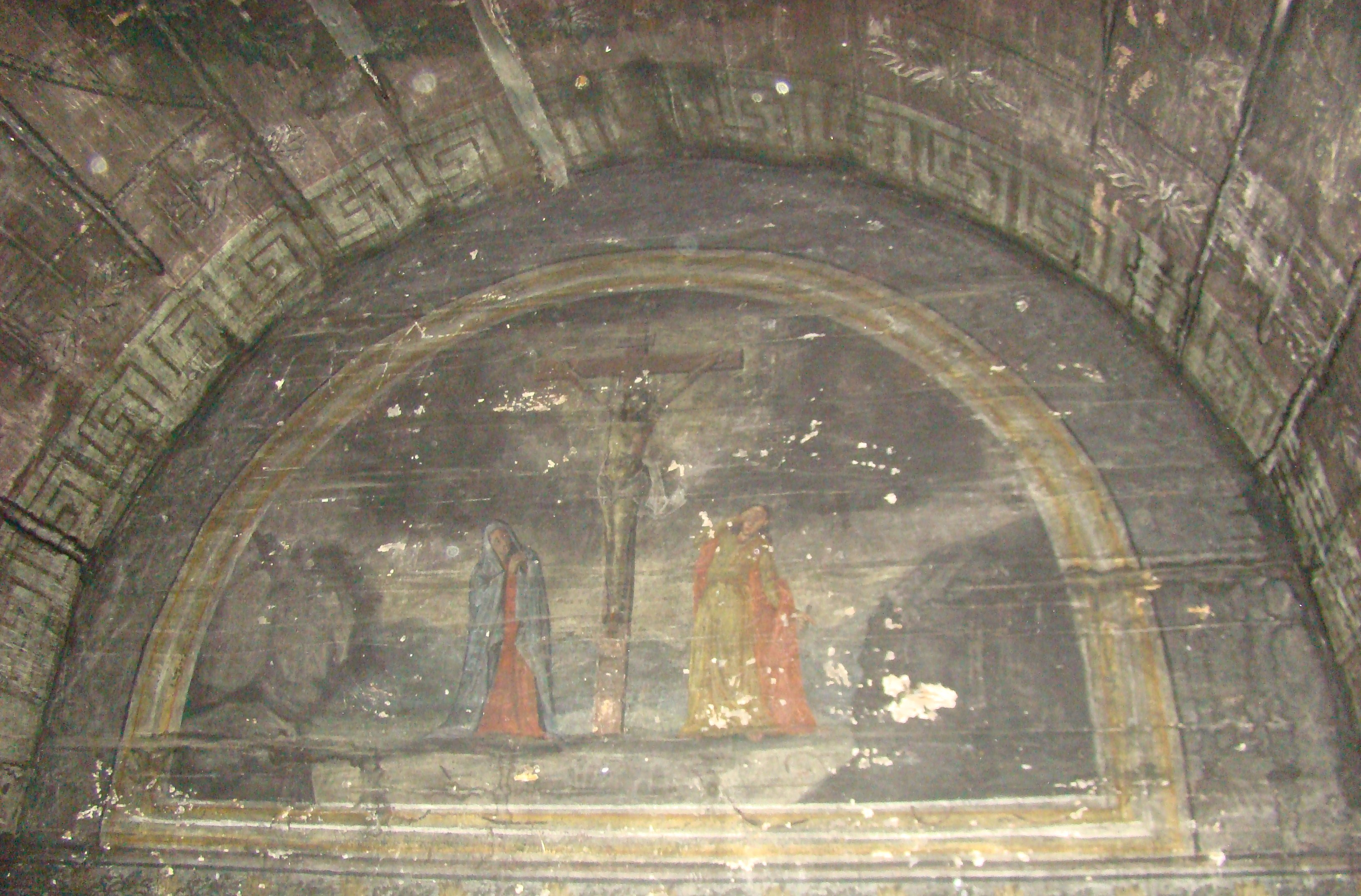 Biserica de lemn "Sfântul Nicolae" (a Nistoreştilor) , oraş SĂLIŞTEA DE SUS